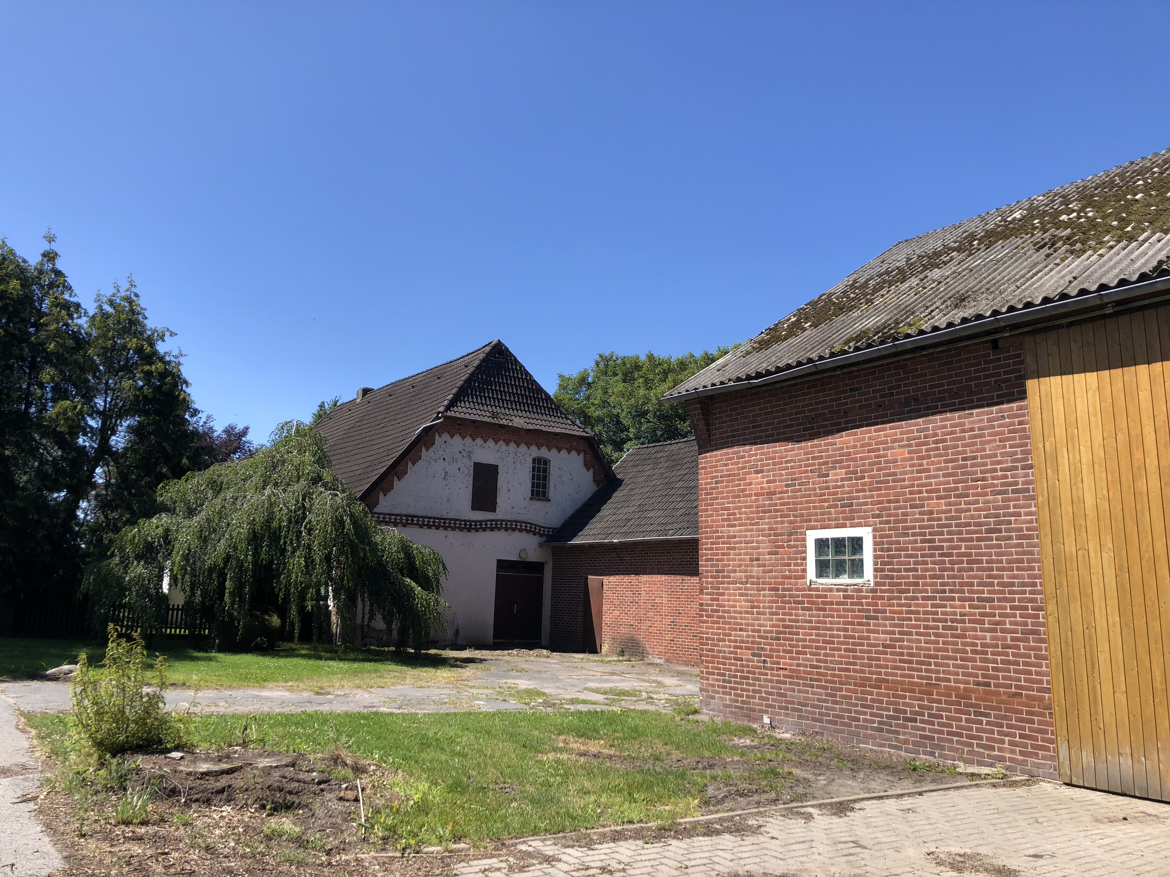 Buurnhuus in Griemshorst